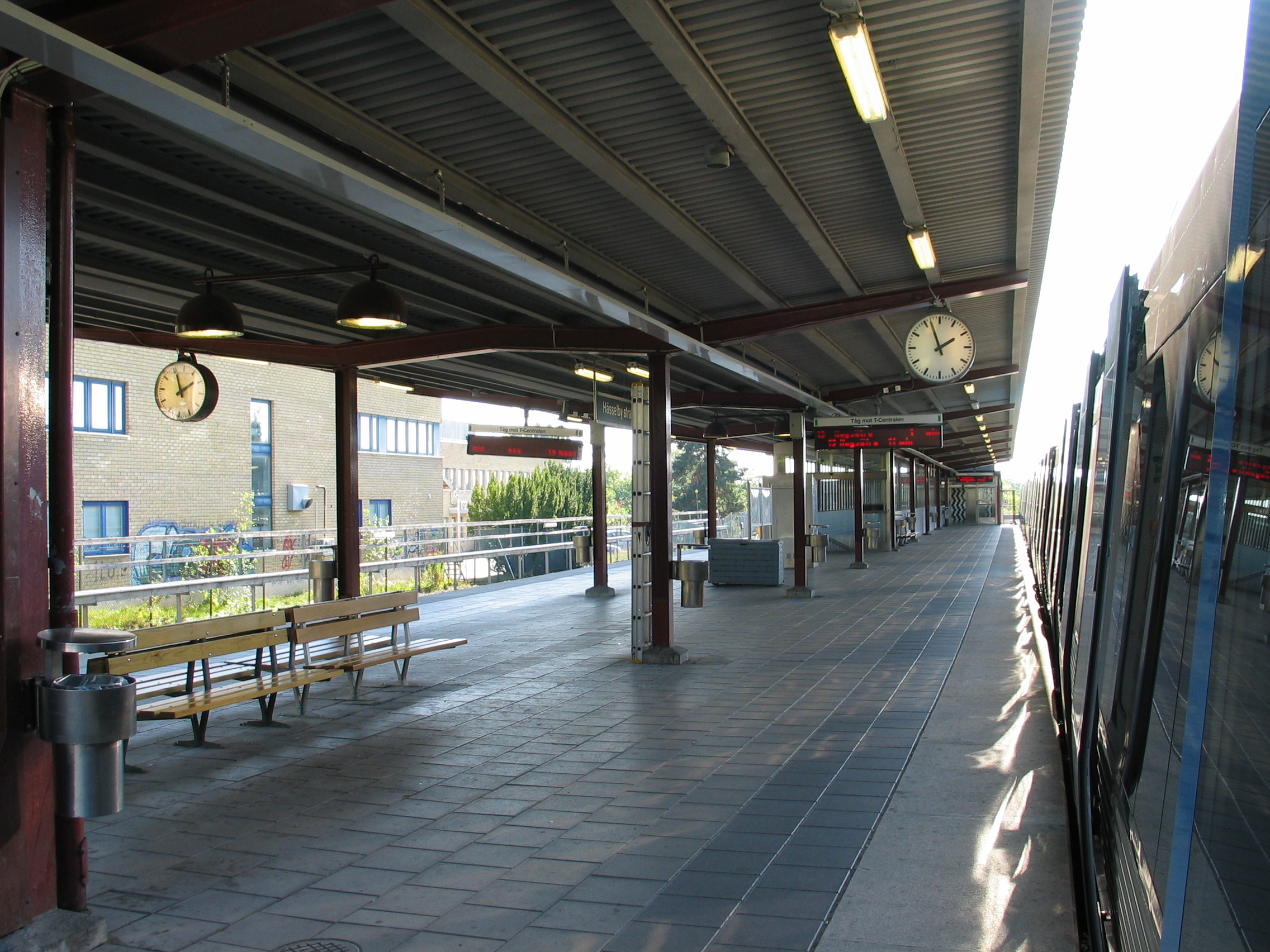 Hässelby Strand, a metro station in Stockholm, Sweden.